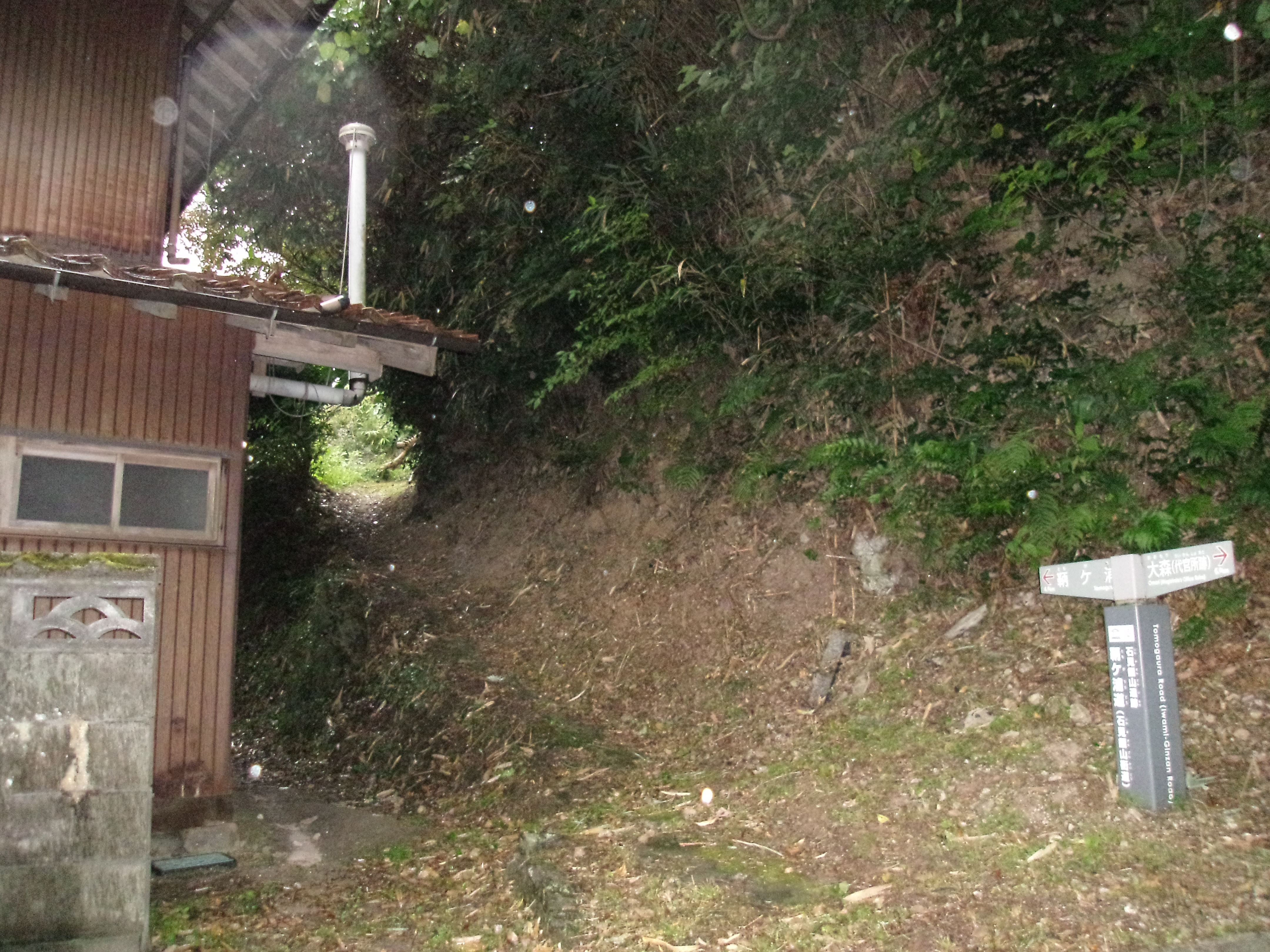 世界遺産「石見銀山」の構成資産である銀山街道鞆ヶ浦道 上野集落の鞆ヶ浦道